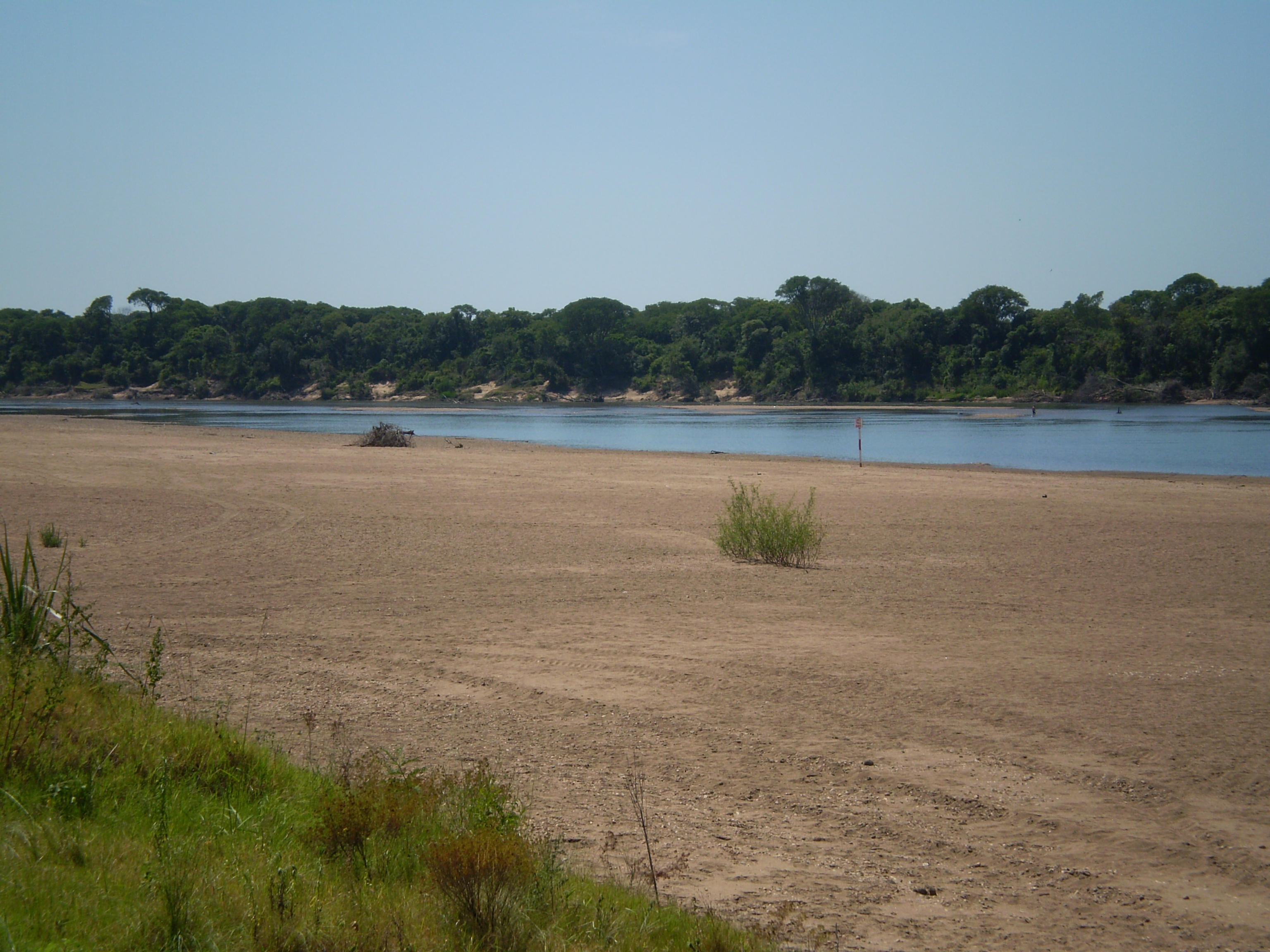 Rio Camaquã in Cristal, Rio Grande do Sul, Brazil.